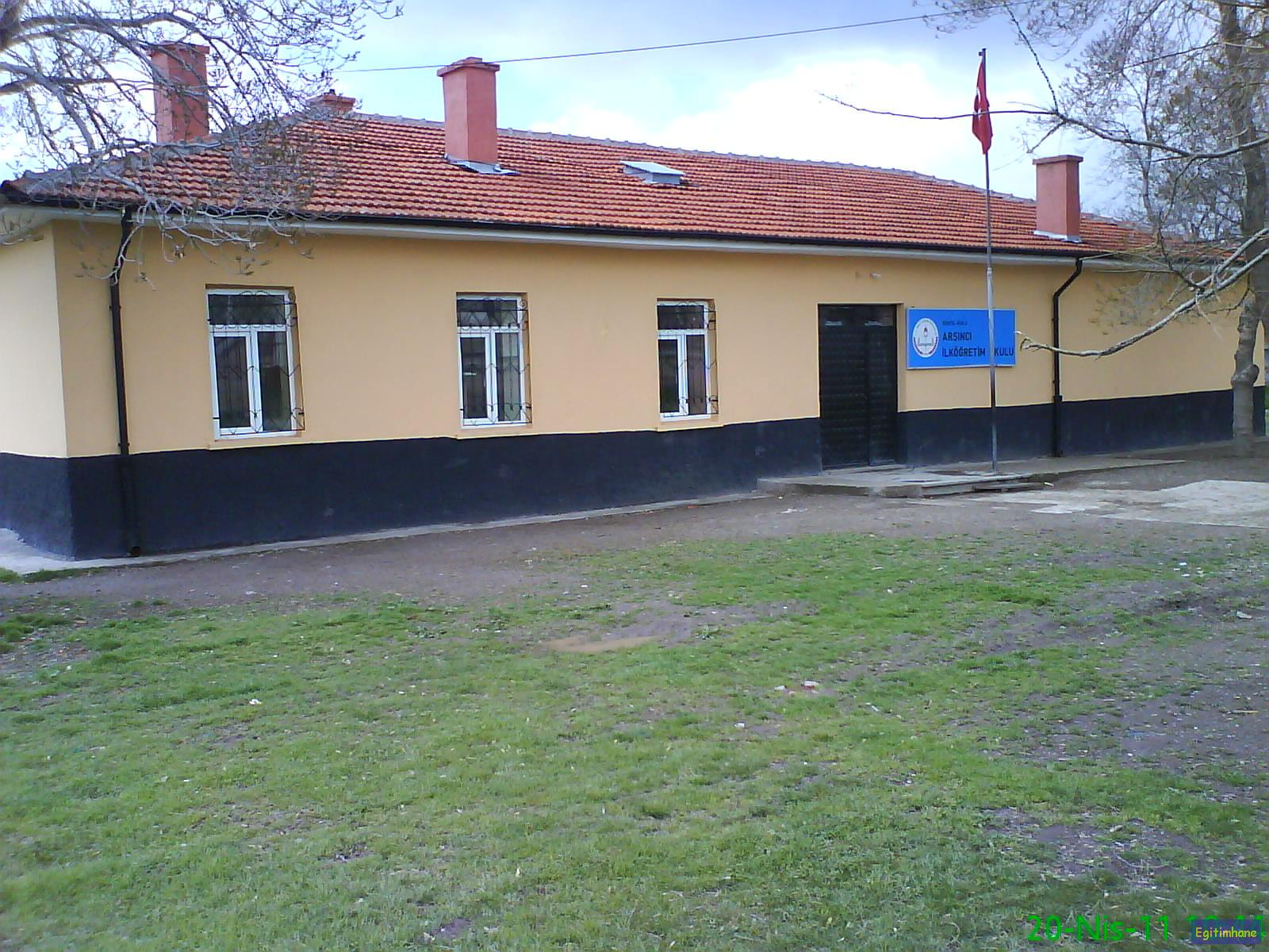 Arsinci Ilkögretim okulu2